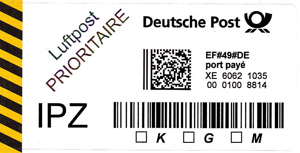 Selbstklebende EasyFranking-Marke der Deutschen Post für den Versand von Auslandsbriefen. Langzeittest von April 2010 bis Dezember 2011. Keine Markteinführung.